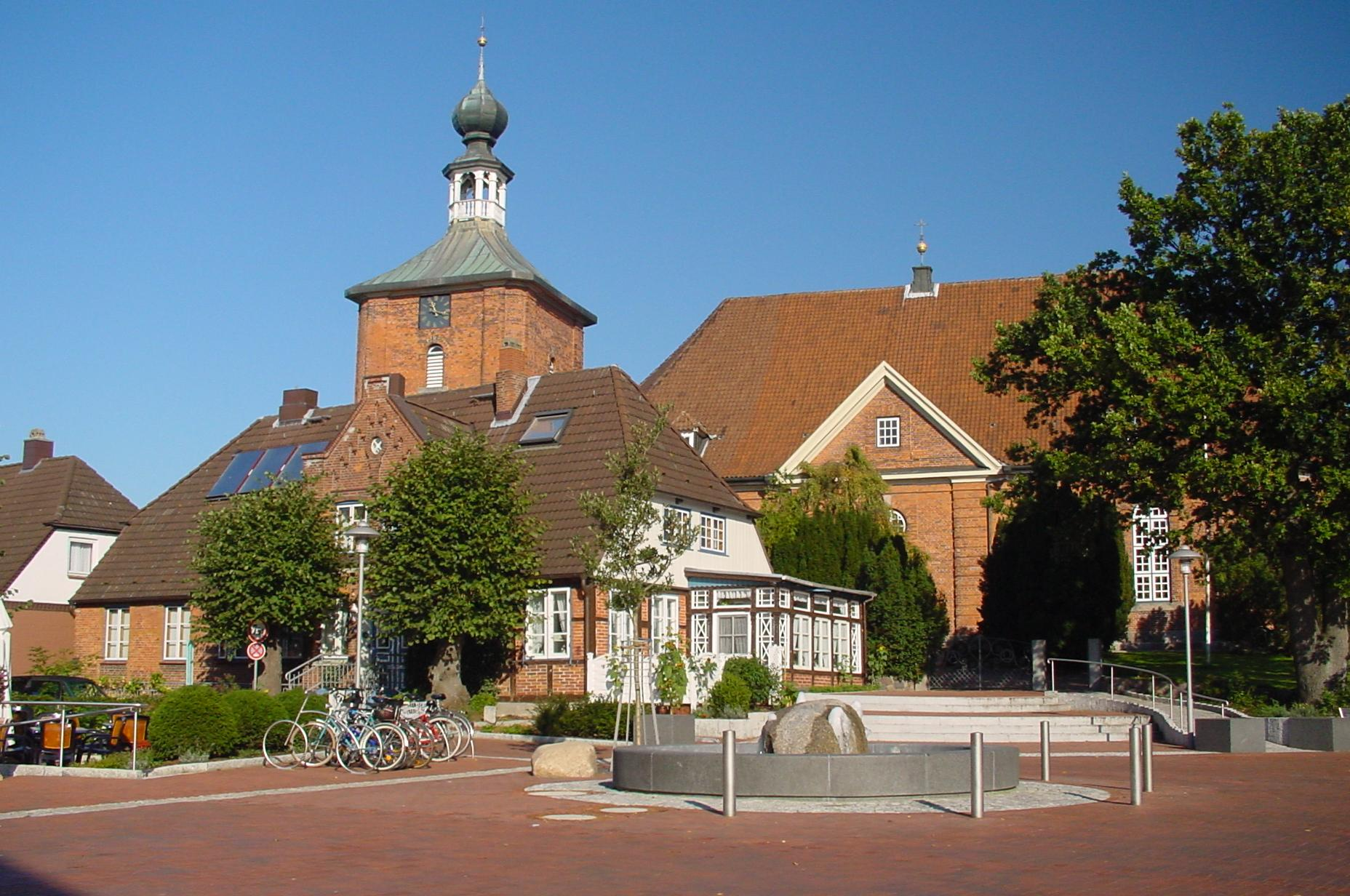 Marktplatz in Schönberg (Holstein) mit evangelischer Kirche